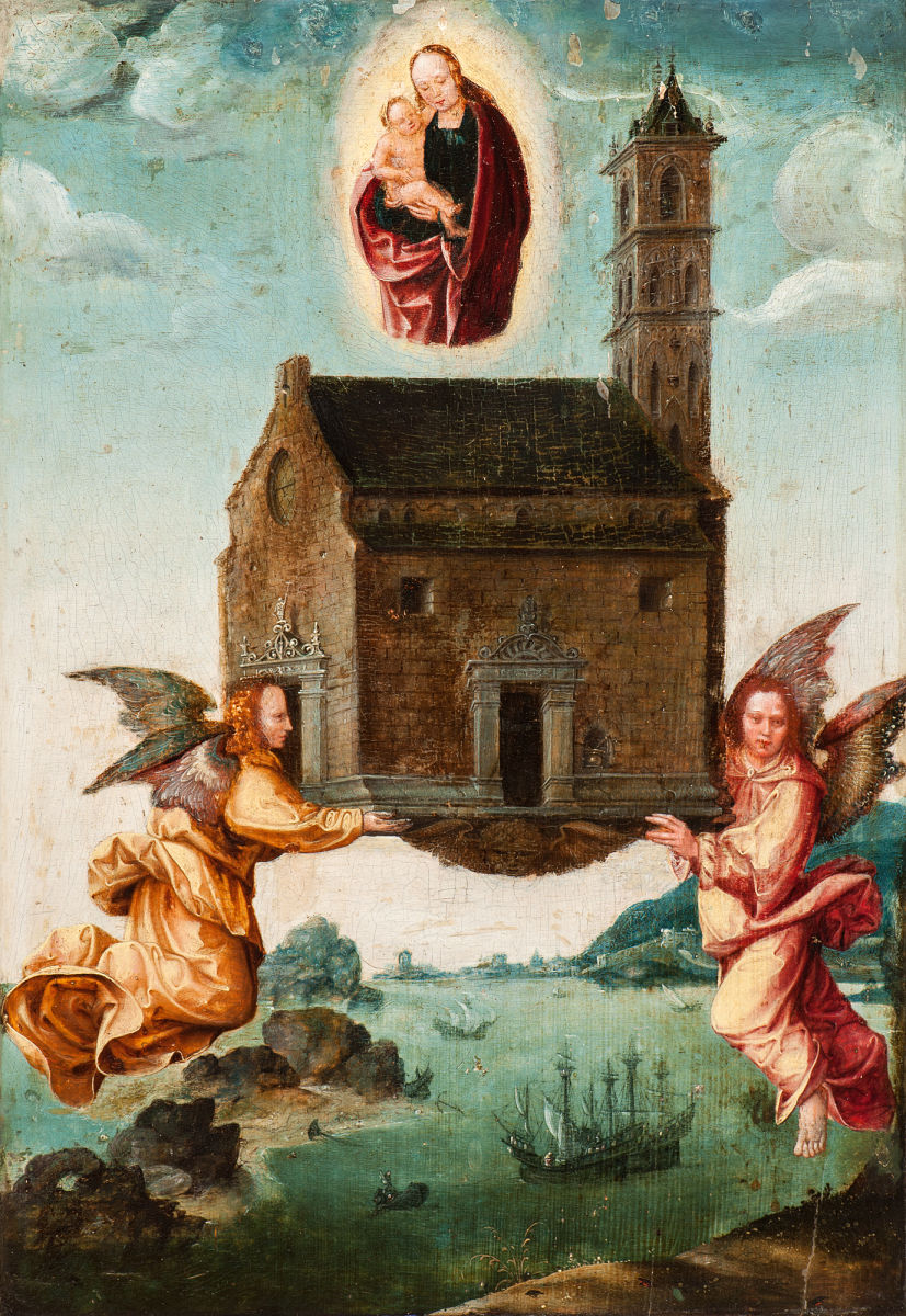 Die Überführung des Hauses der Maria nach Loreto. Öl auf Holz, 54 x 37 cm. Wohl Brügge 1. Hälfte 16. Jh.